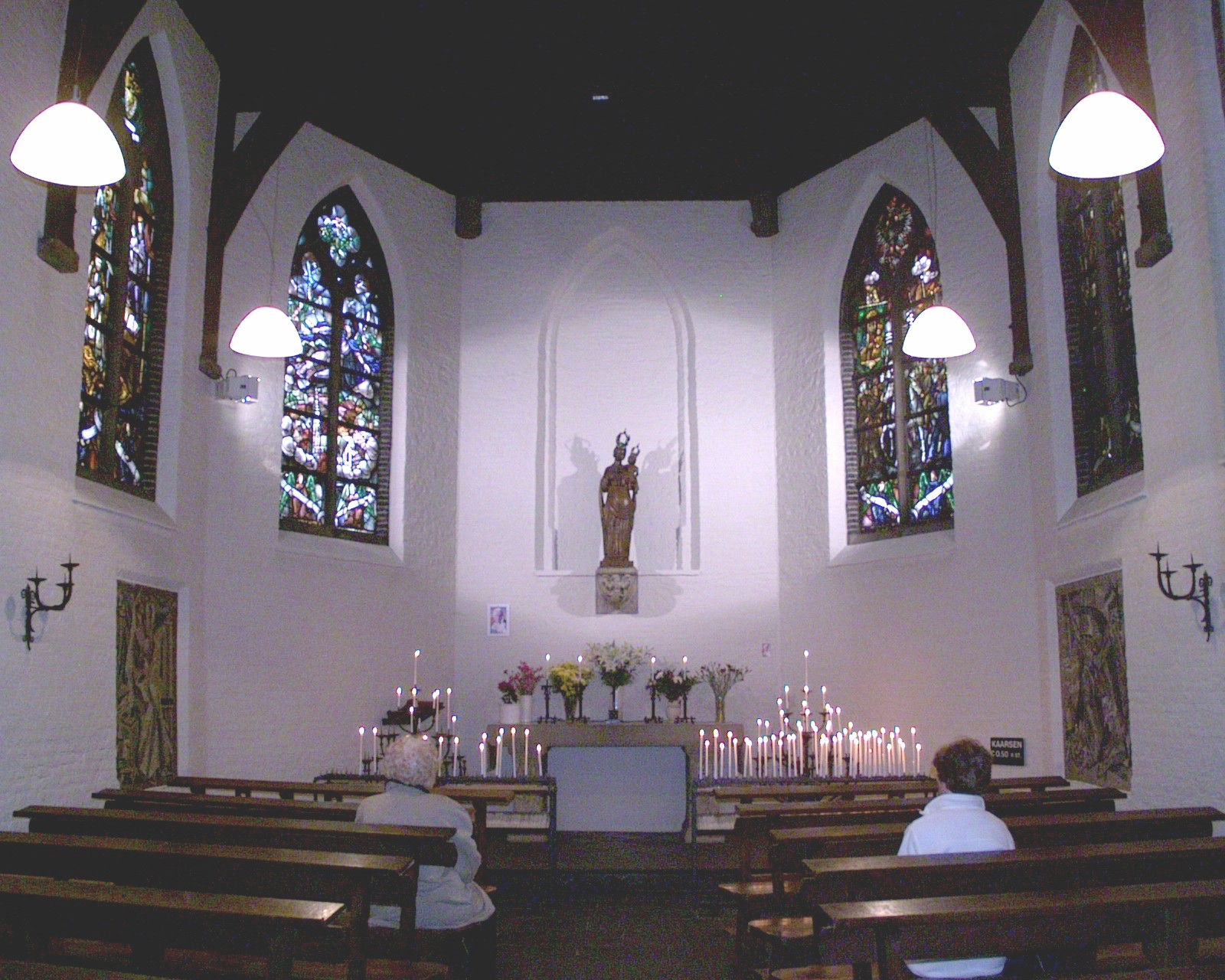 Zicht op een deel van het interieur van de Sint Joostkapel (Breda) gevestigd in de Ginnekenstraat 23 in het centrum van Breda